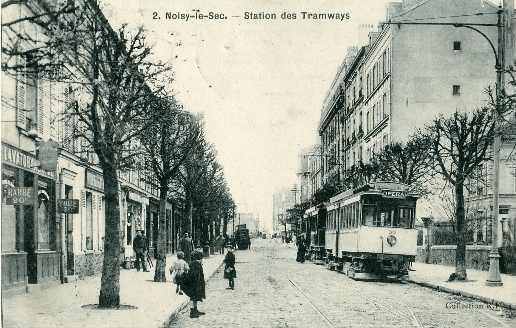 Carte postale ancienne éditée par R.F. N°2 NOISY-LE-SEC : Station des tramways Il s'agit de la rue de la Forge, l'actuelle rue Jean Jaurès. La gare est au fond.